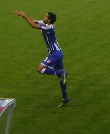 Pablo Insua